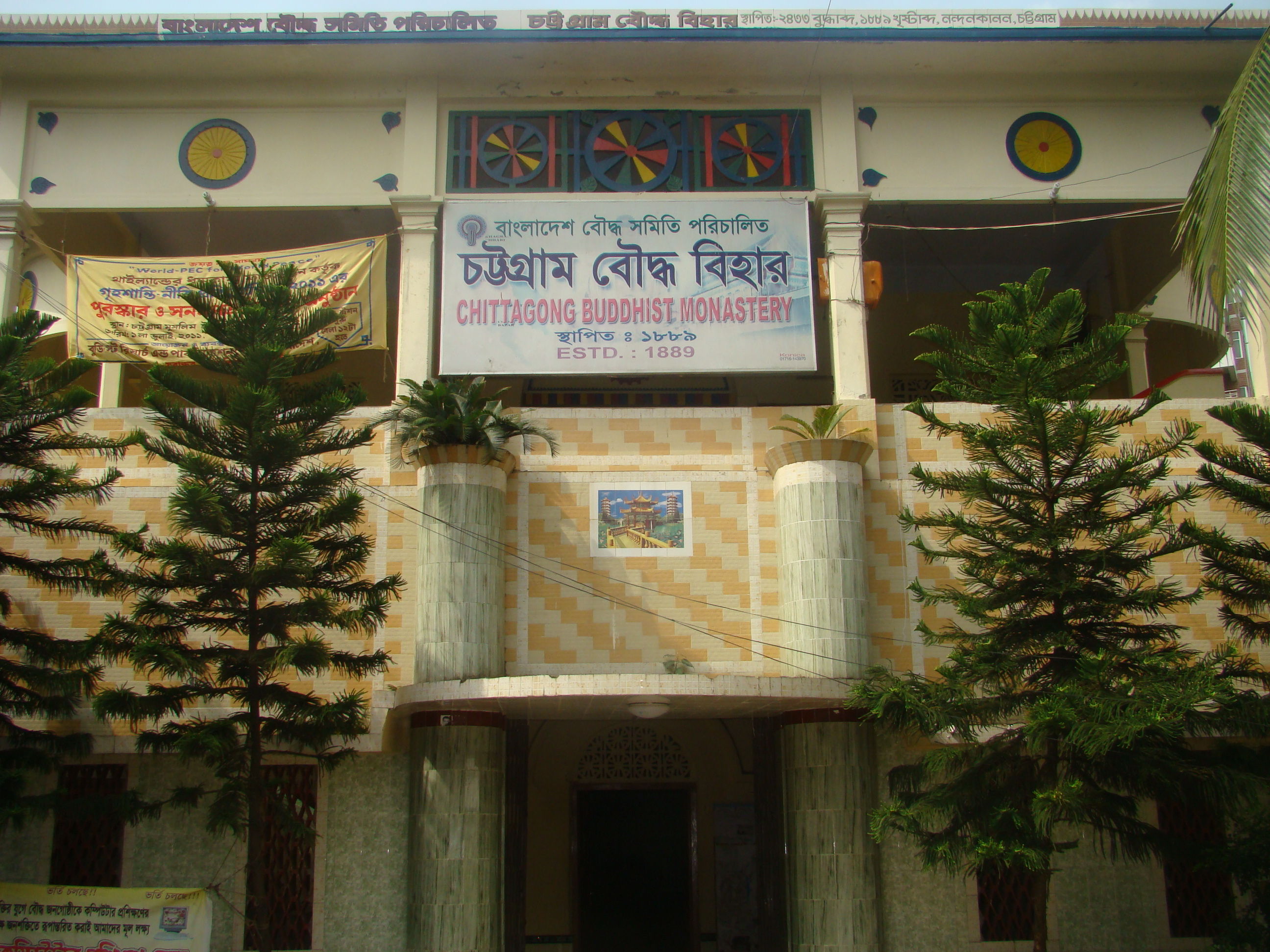 চট্টগ্রাম বৌদ্ধ বিহারের মূল ভবন